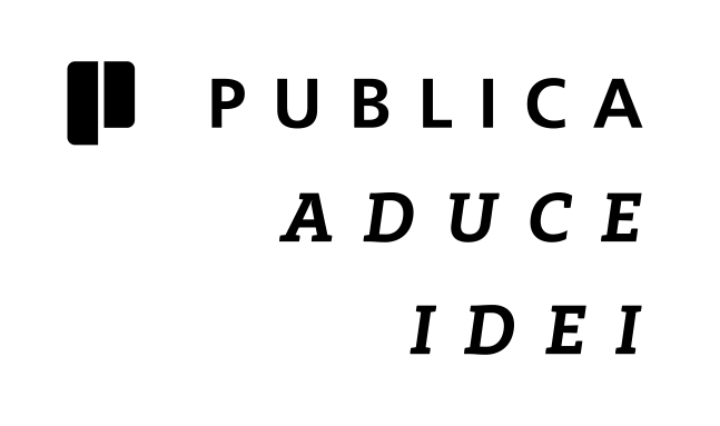 Editura Publica